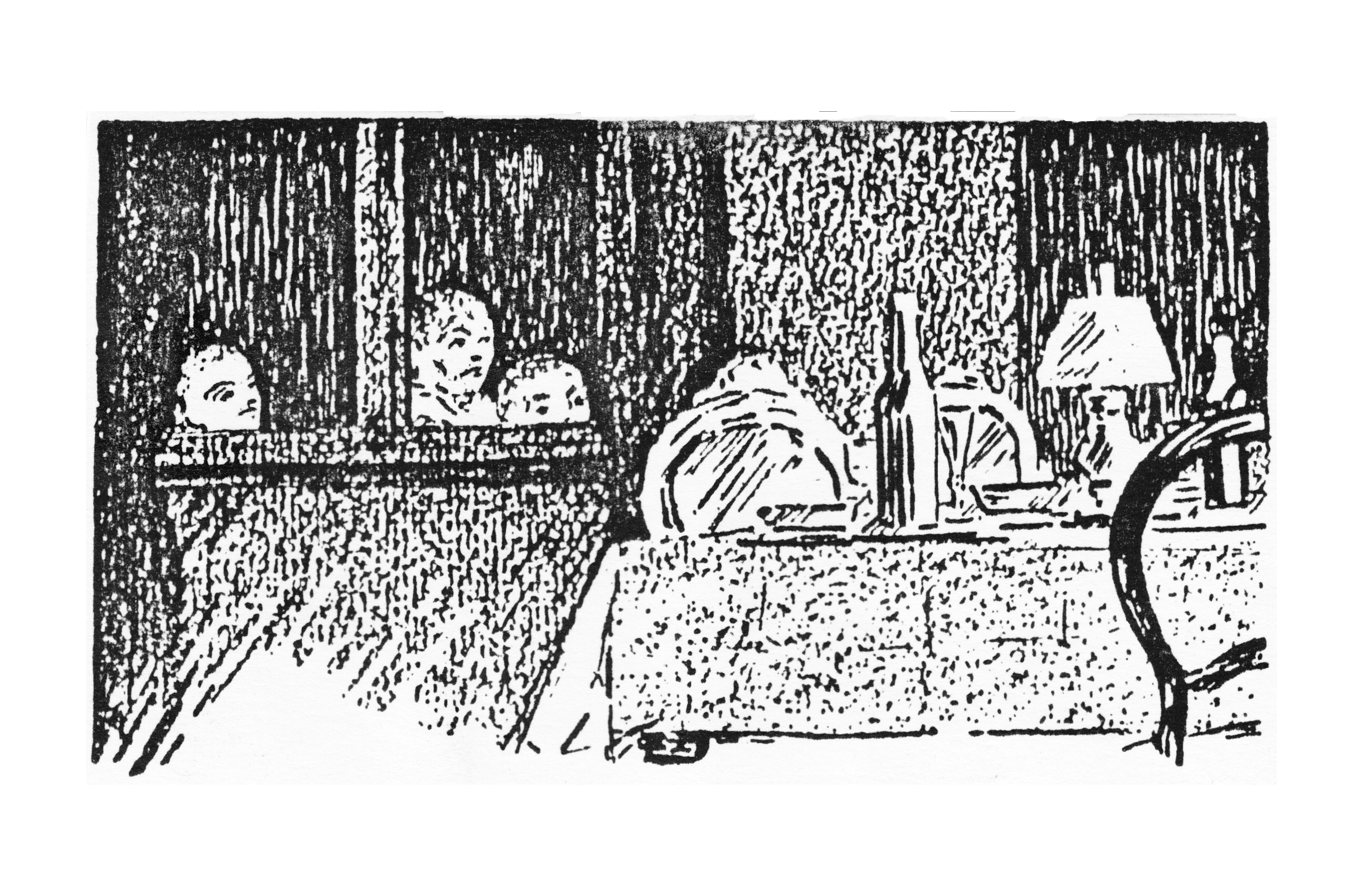 Kinder schauen in die warme Stube